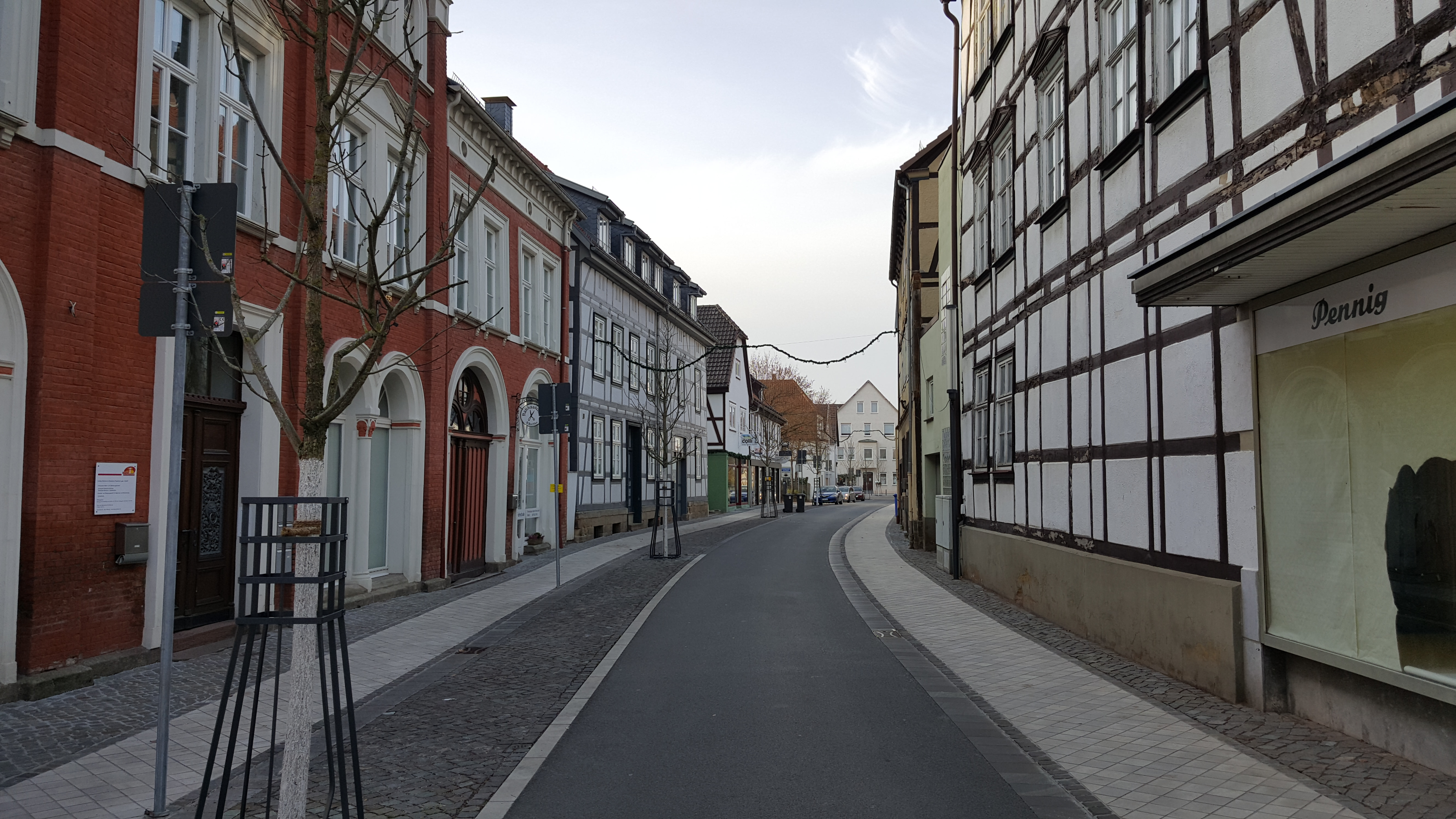 Markstraße 10, Warburg